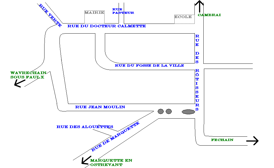 plan de wasnes-au-bac Source : olivierb Statut : GFDL